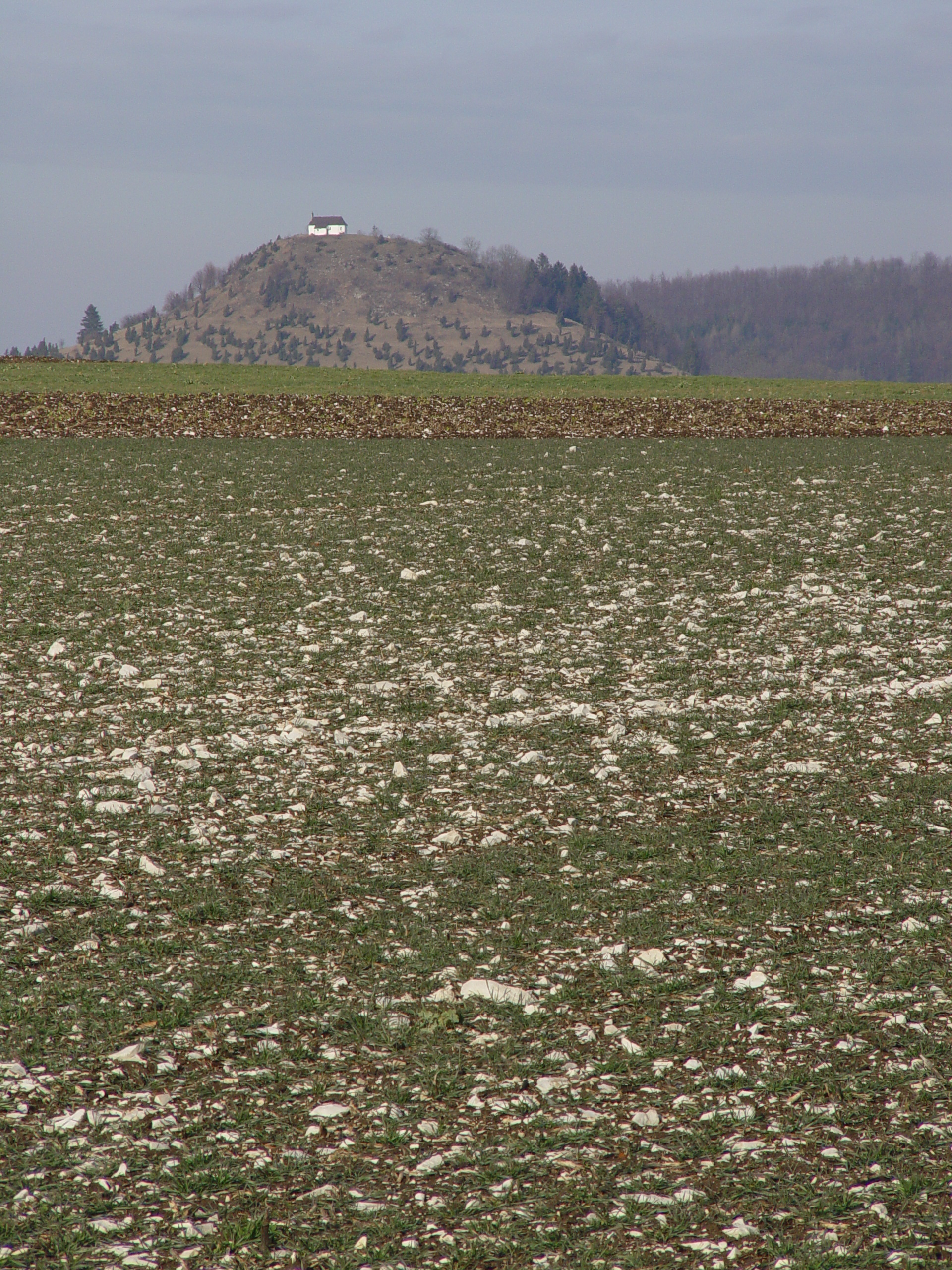 Kornbühl Salmendingen, Deutschland; von Süden aus gesehen